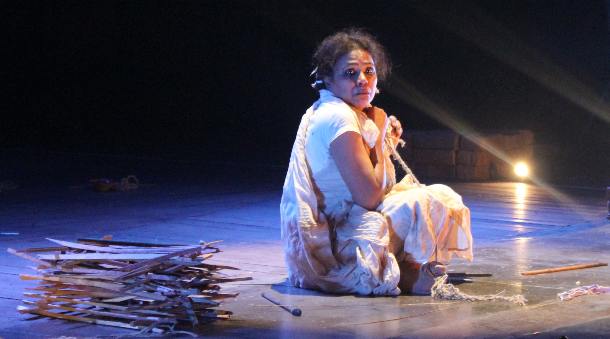 অসমীয়া: বিশ্বকবি ৰবীন্দ্রনাথ ঠাকুৰৰ ‘স্ত্রীৰ পত্র’ নাটকৰ এটি দৃশ্যত অভিনেত্রী সীমা বিশ্বাস।